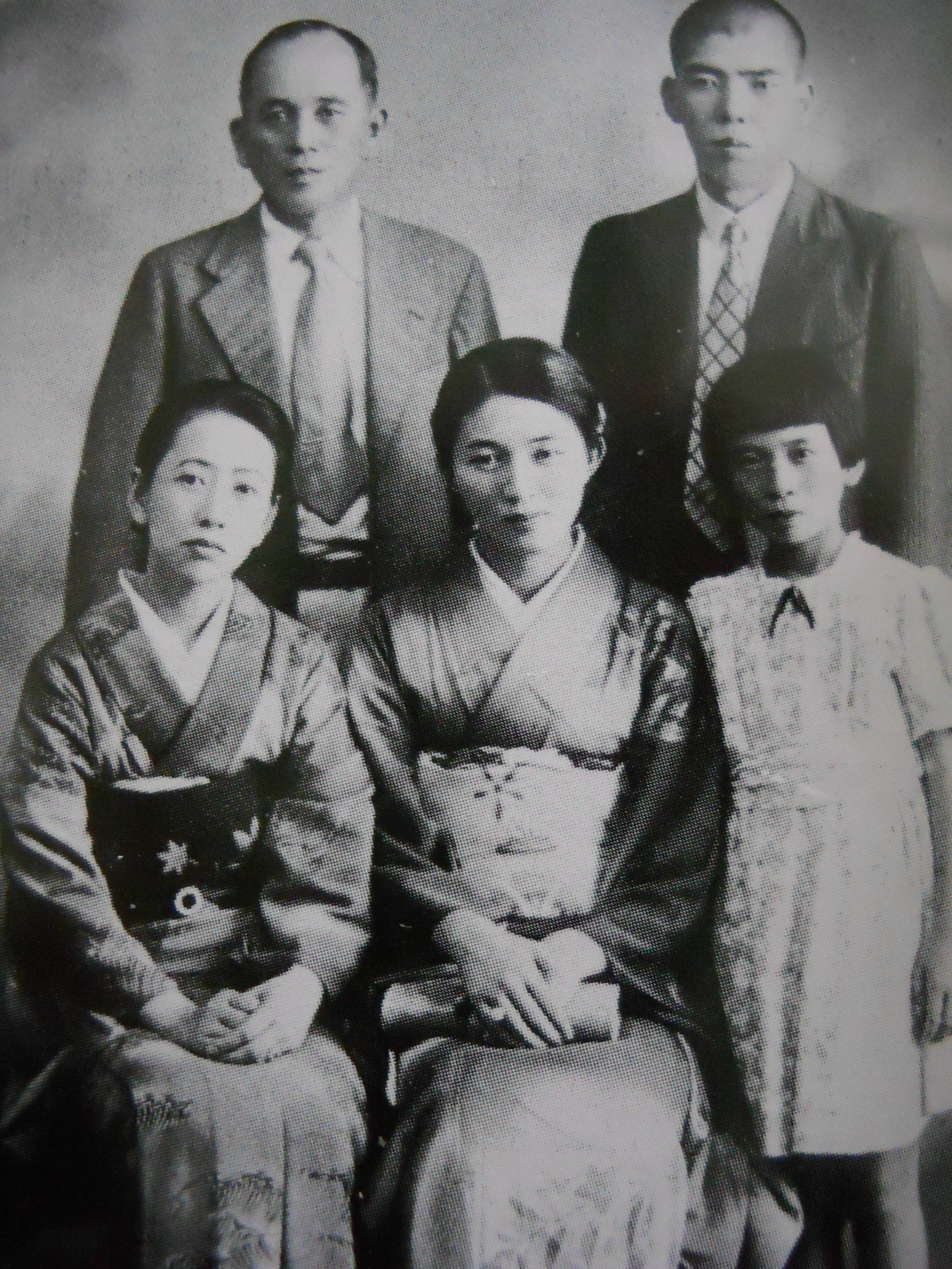 Zirou Ishiba Ｆａｍｉｌｙ